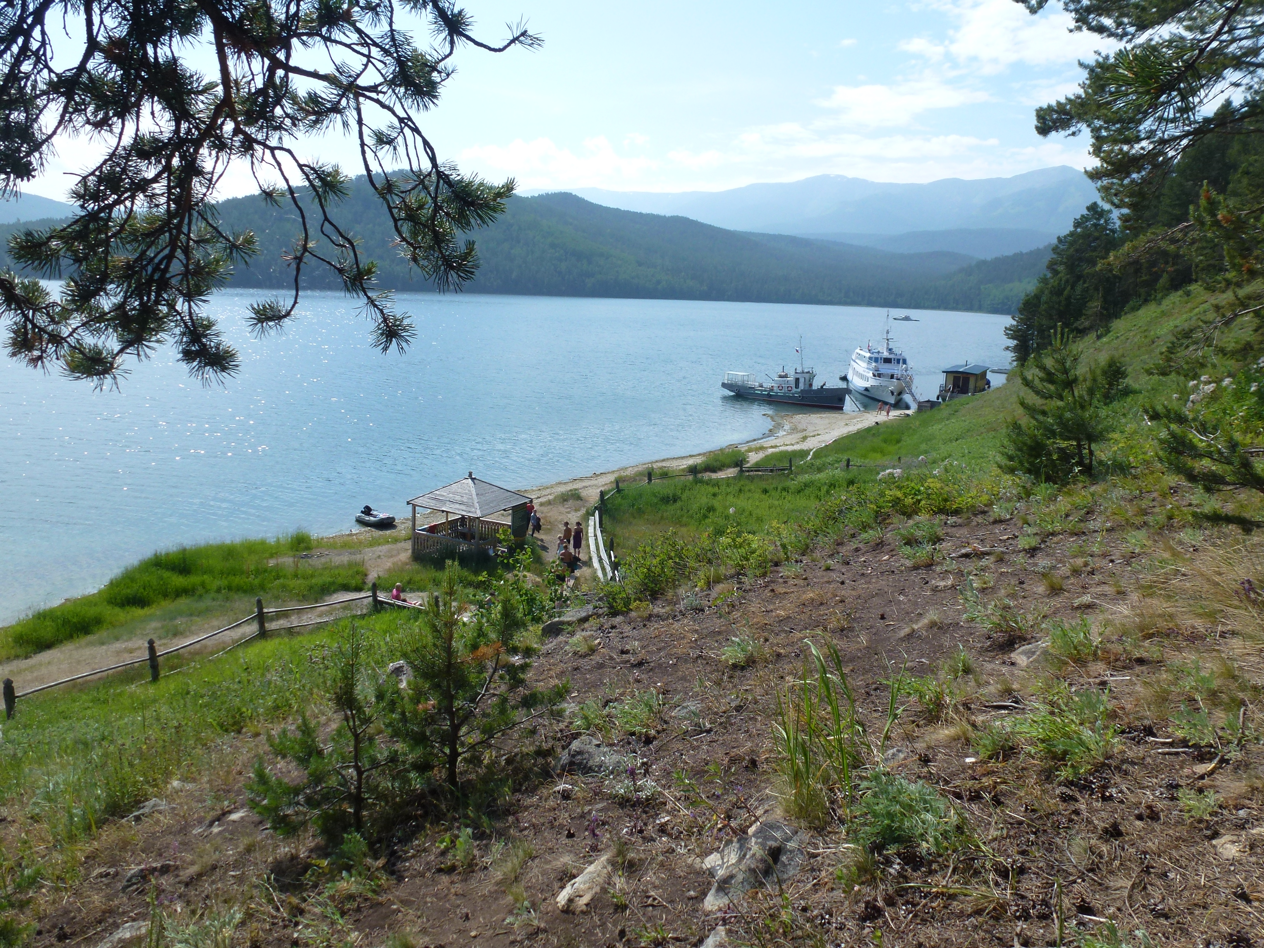 Змеиный источник: Баргузинский район, Бурятия This image is related to the protected area of Russia number 0310003